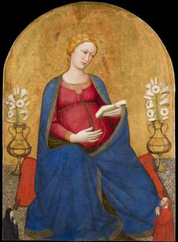 Madonna del Parto de de la Pieve de Montefiesole, Pontassieve (Italie)